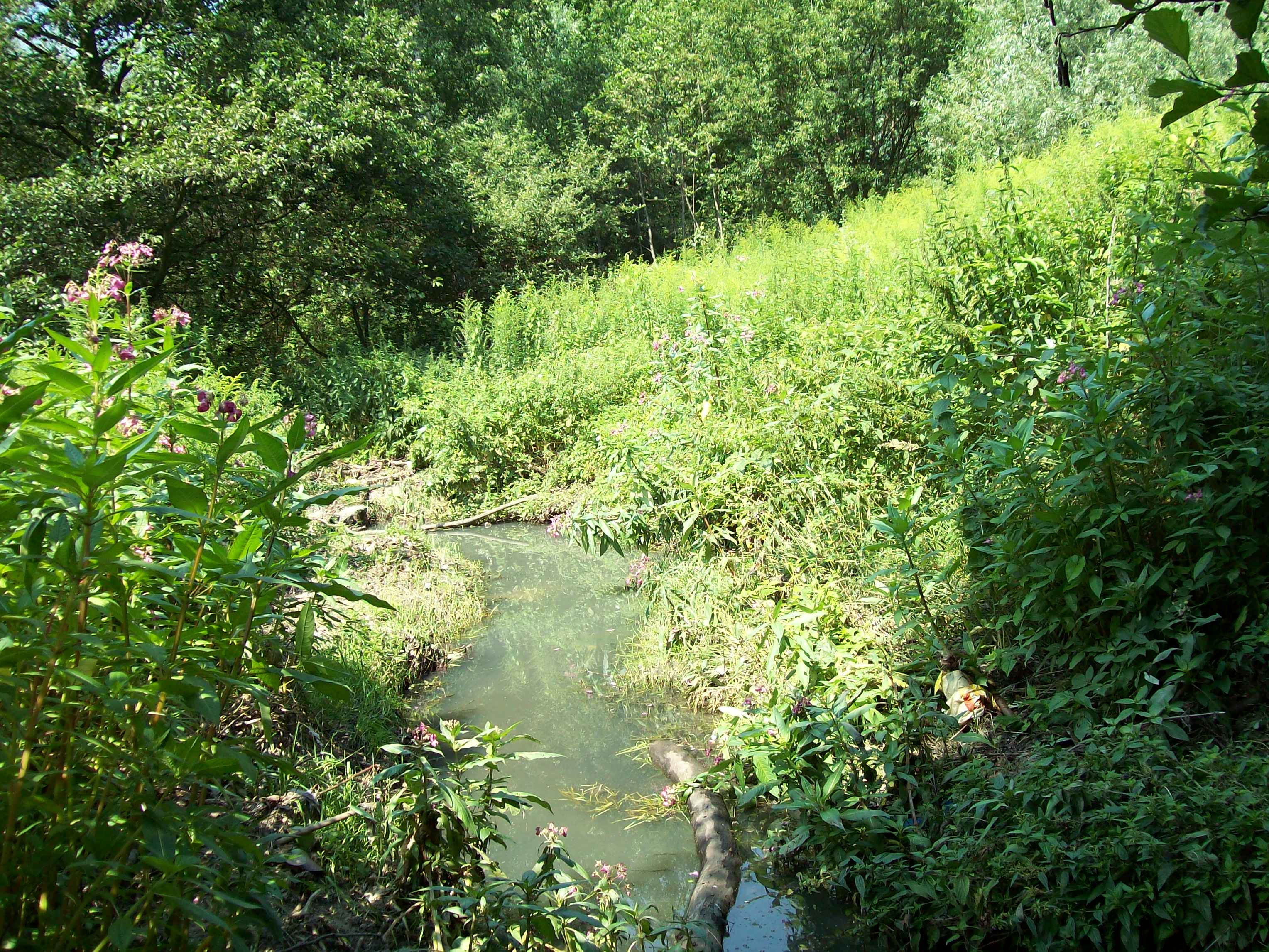 Rzeka Ślepiotka, Katowice Piotrowice